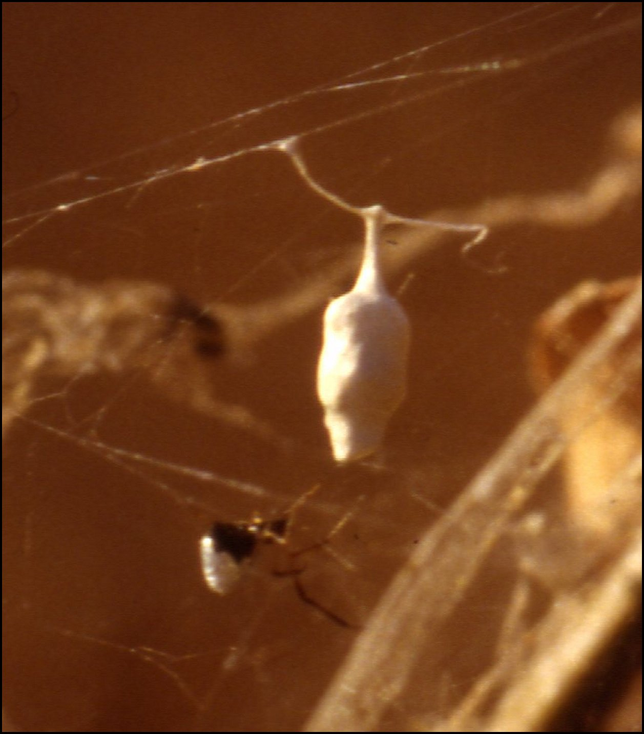 Argyrodes argentatus près de son cocon. Sri-Lanka